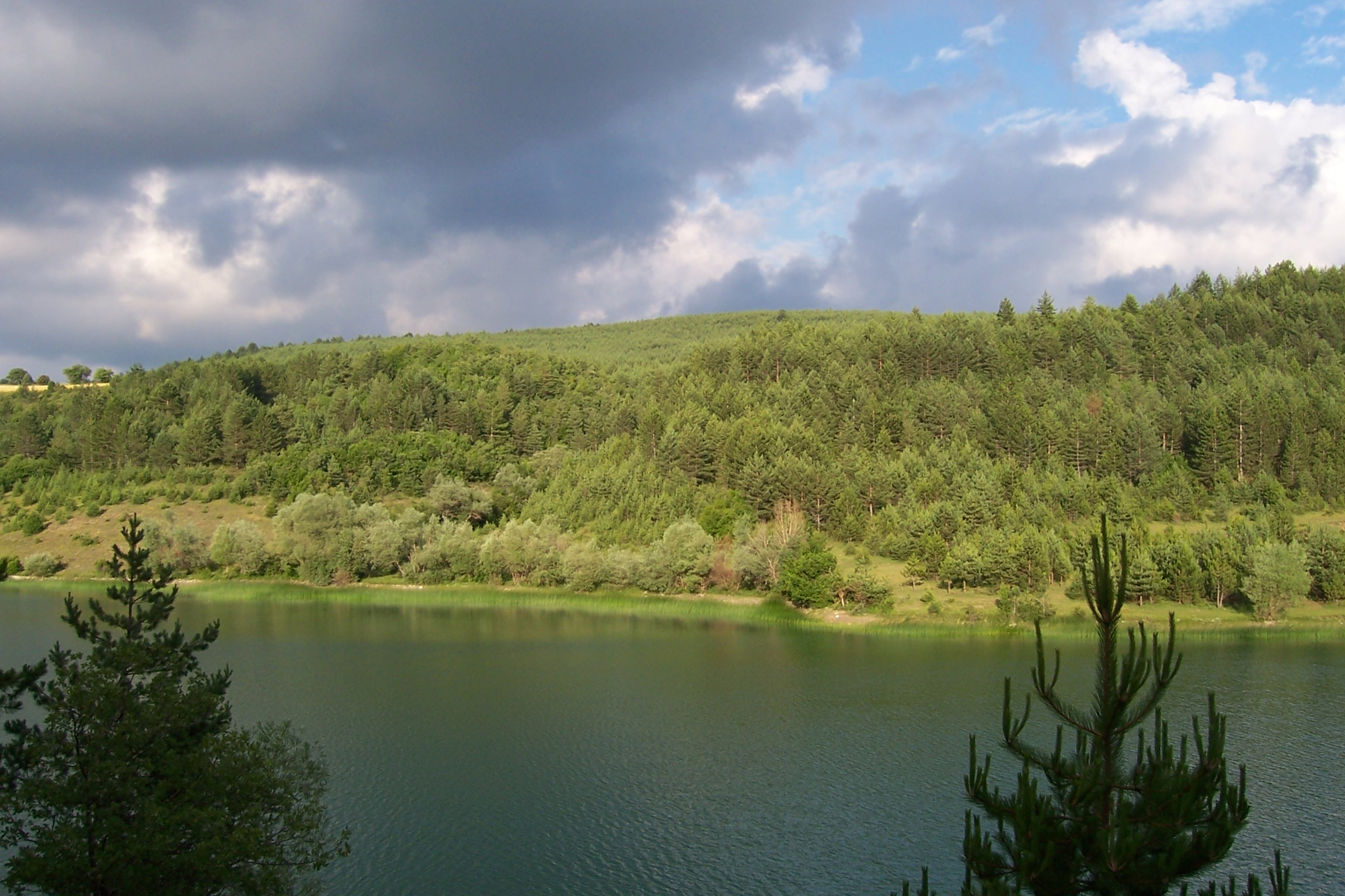 Eflani